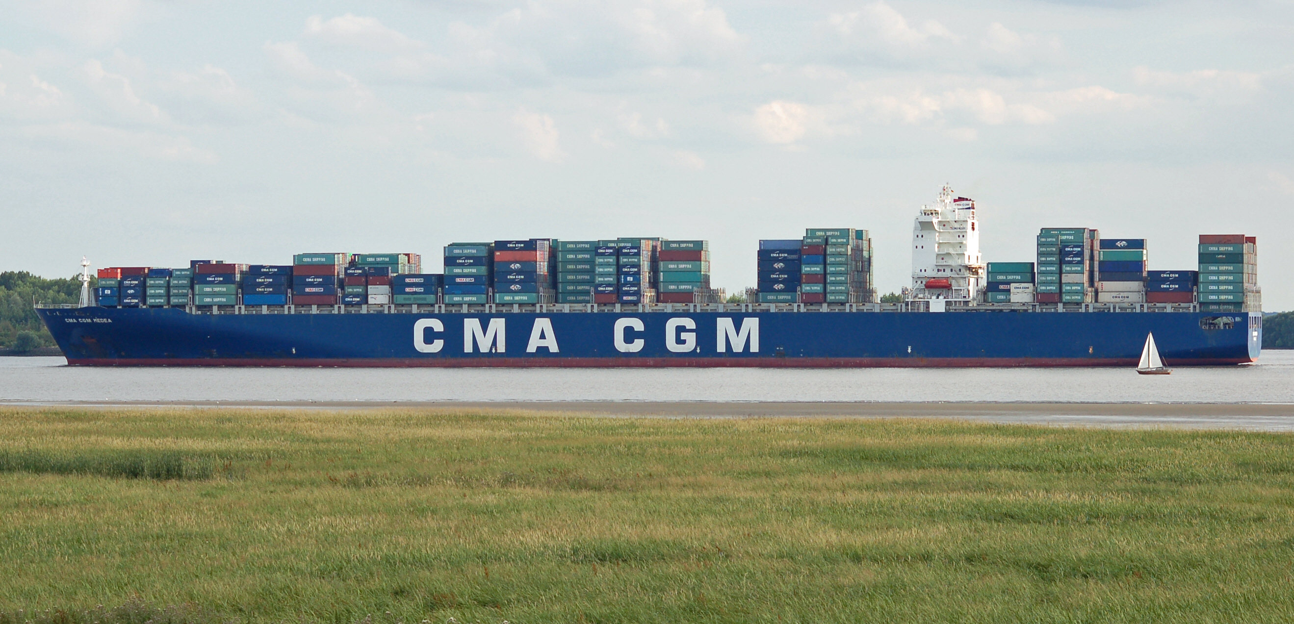 Das Containerschiff CMA CGM Medea auf der Elbe bei Wedel. IMO-Nummer: 9299800 MMSI-Nummer: 228342900 Rufzeichen: FMFR Länge: 348.0m Breite: 43.0m Flagge: France